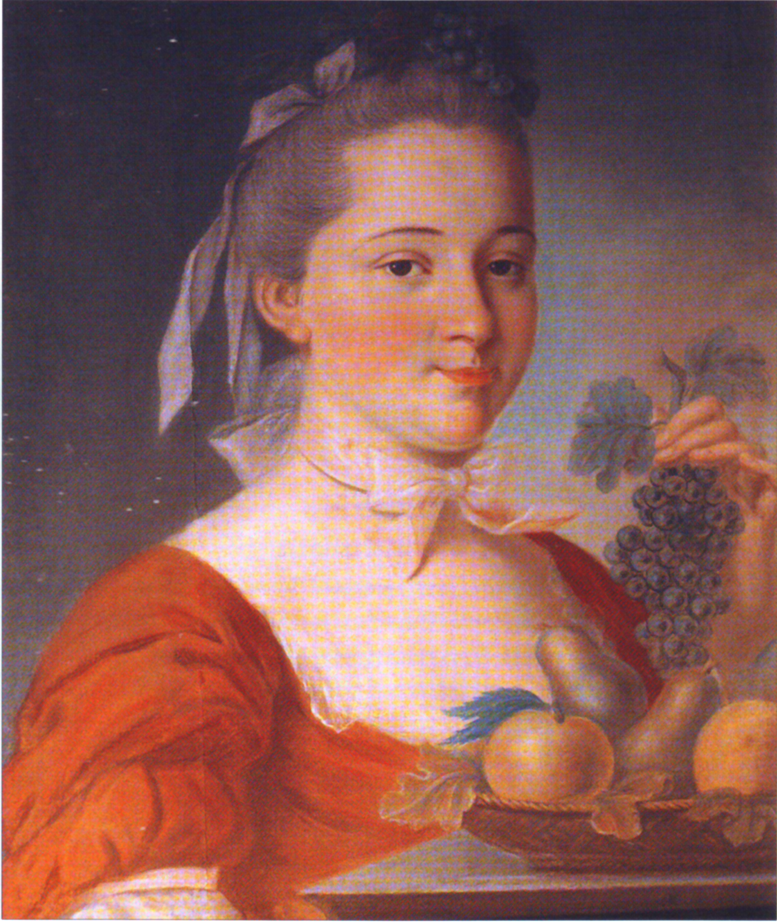 Жан де Самсуа. Портрет М.П.Салтыковой - "Осень", 1756. Матрена Павловна Салтыкова (ок. 1730-1813), дочь П.Ф. Балка-Полева от брака с М.Ф. Полевой, с 1750 жена С.В. Салтыкова (1726-1776)